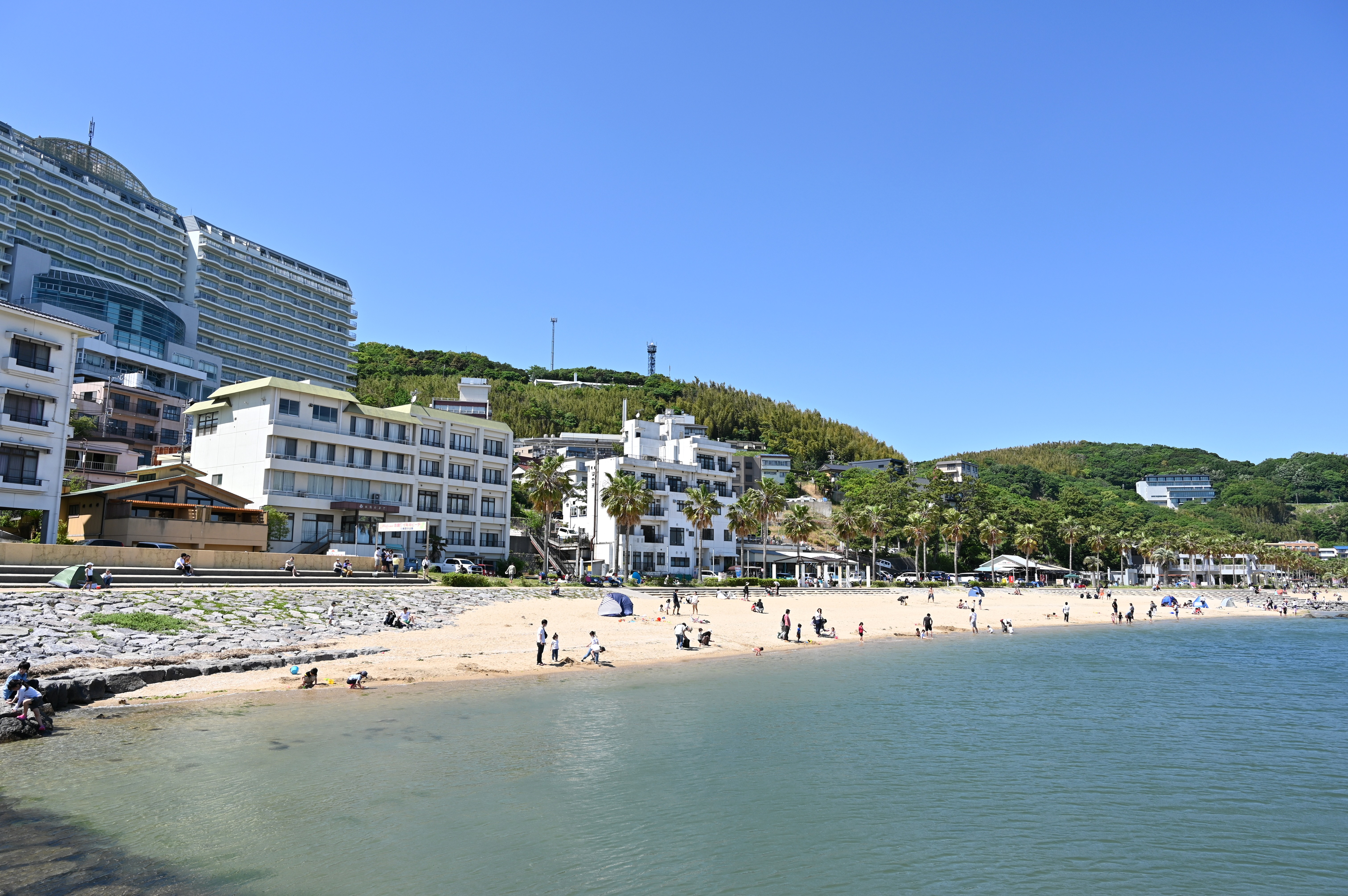 吉良ワイキキビーチ